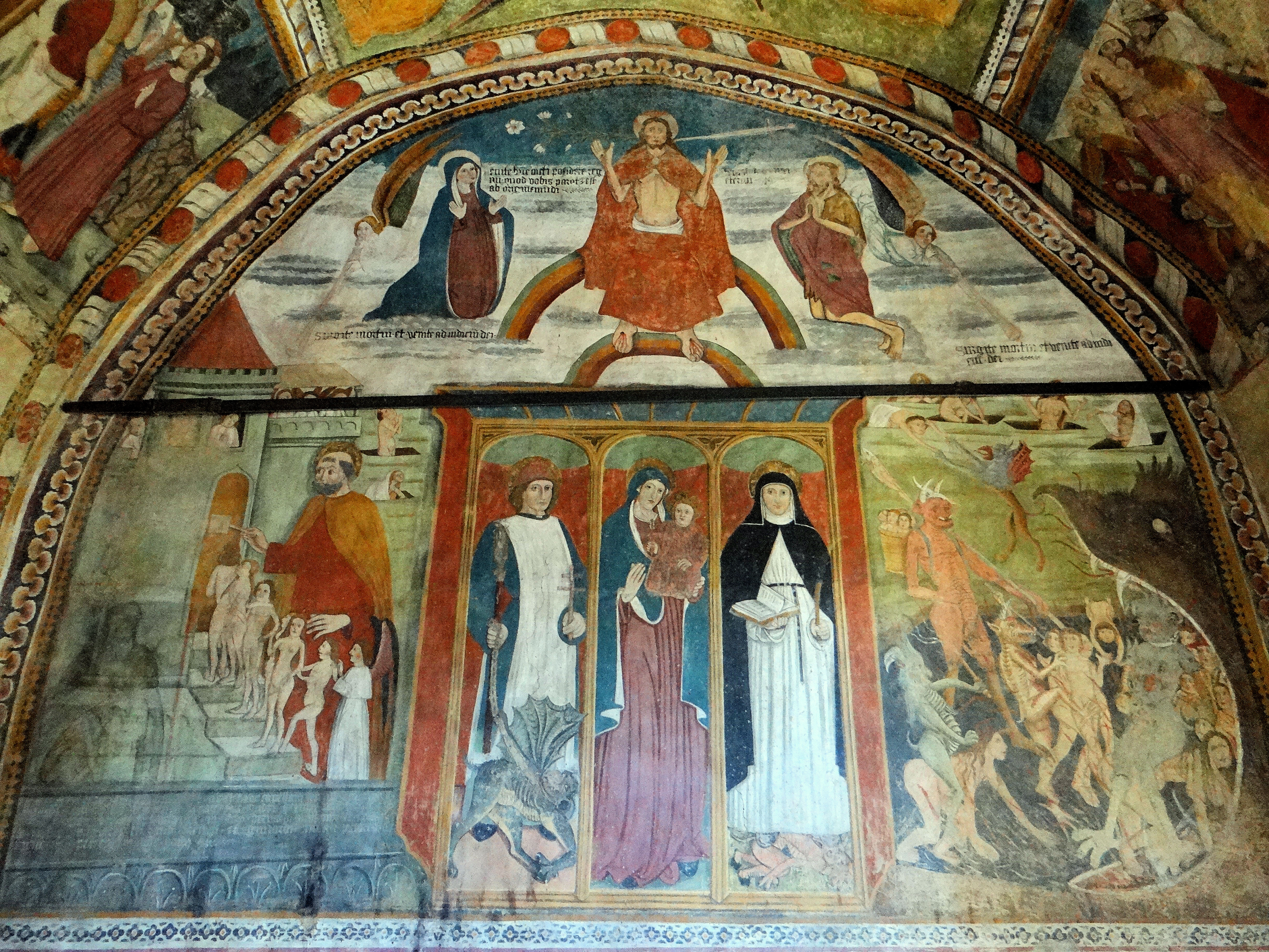 La Tour - Chapelle des Pénitents blancs - Jugement dernier